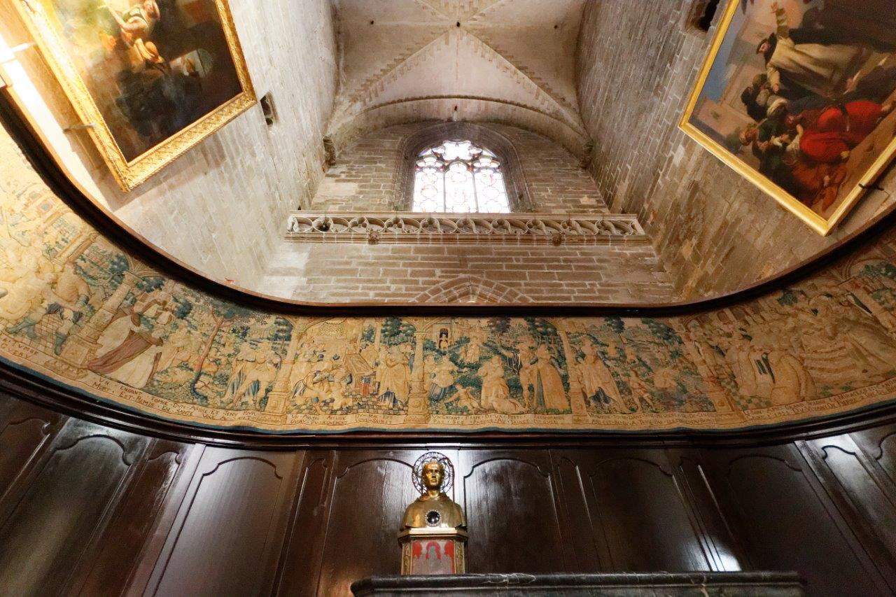 Autel-tombeau, buste reliquaire, Tapisserie des Miracles (XVIe)